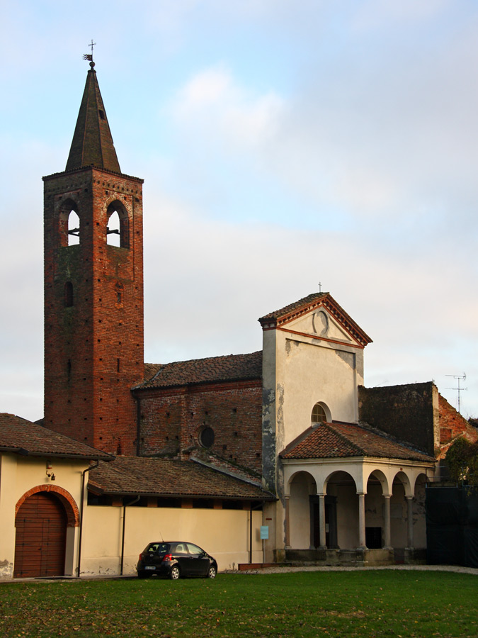 Abbazia di Sant'Albino a Mortara (PV)